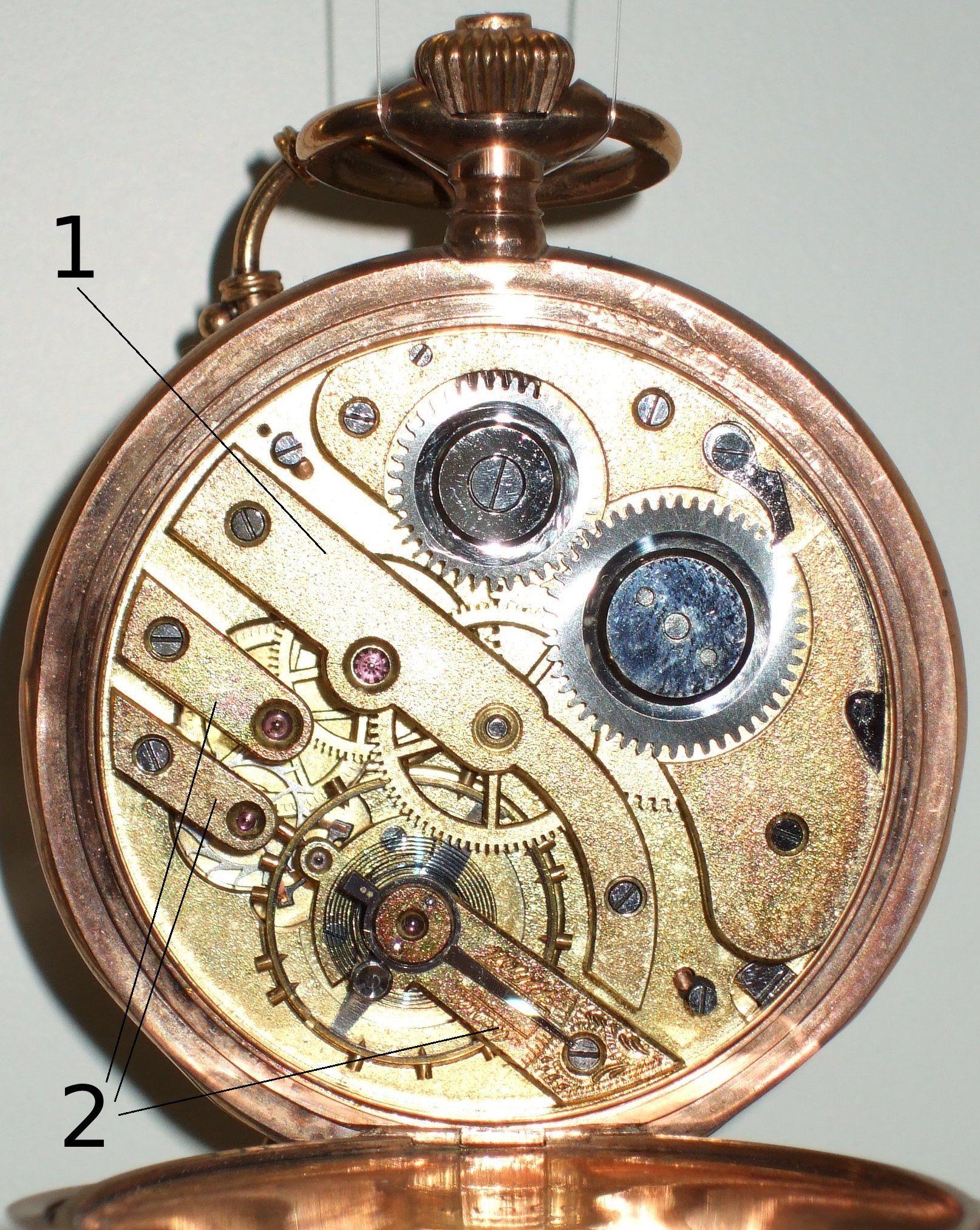 Taschenuhrwerk. (Ausstellungsstück der Uhrensammlung Karl Gebhardt in Nürnberg ) 1 zeigt eine Brücke. 2 zeigt einen Kloben.